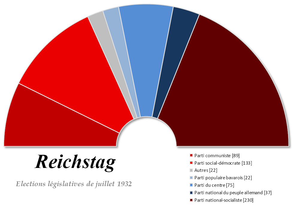 Composition du Reichstag allemand après les élections fédérales de juillet 1932